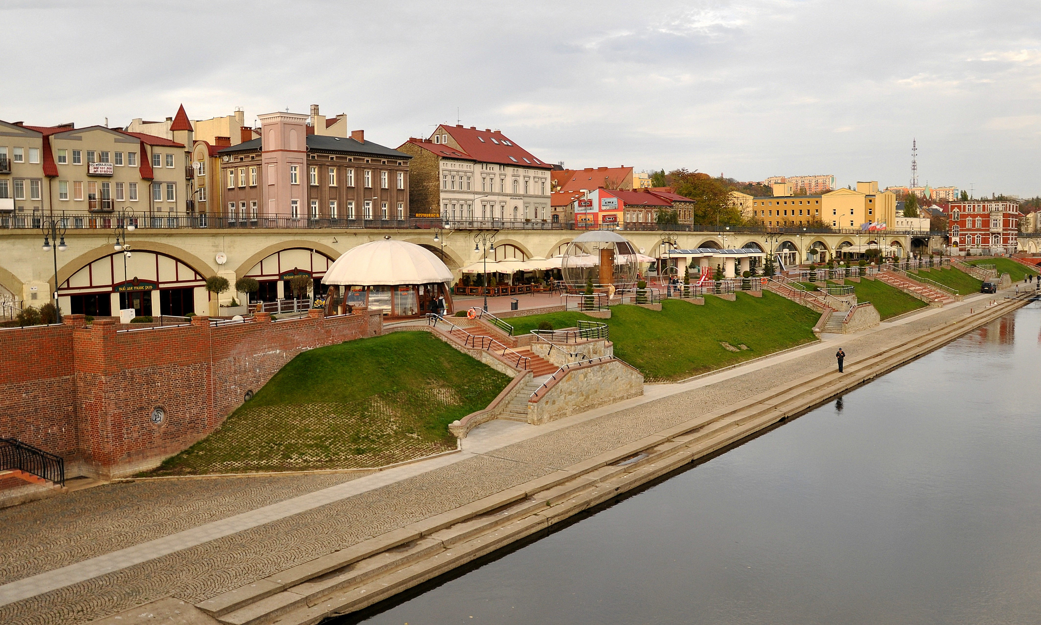 Gorzow Wielkopolski